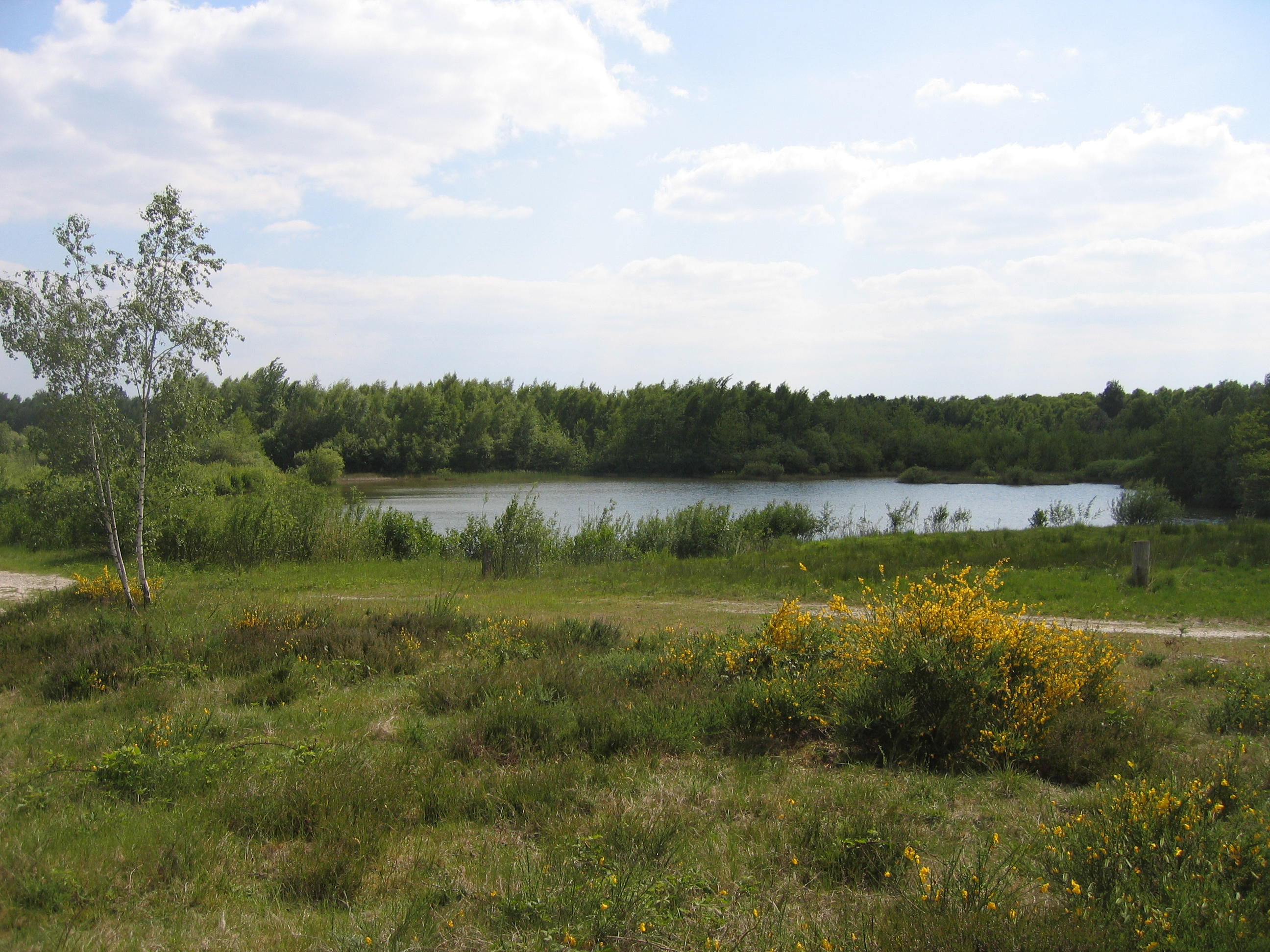 Wahner Heide, Landschaften, Mai 2008